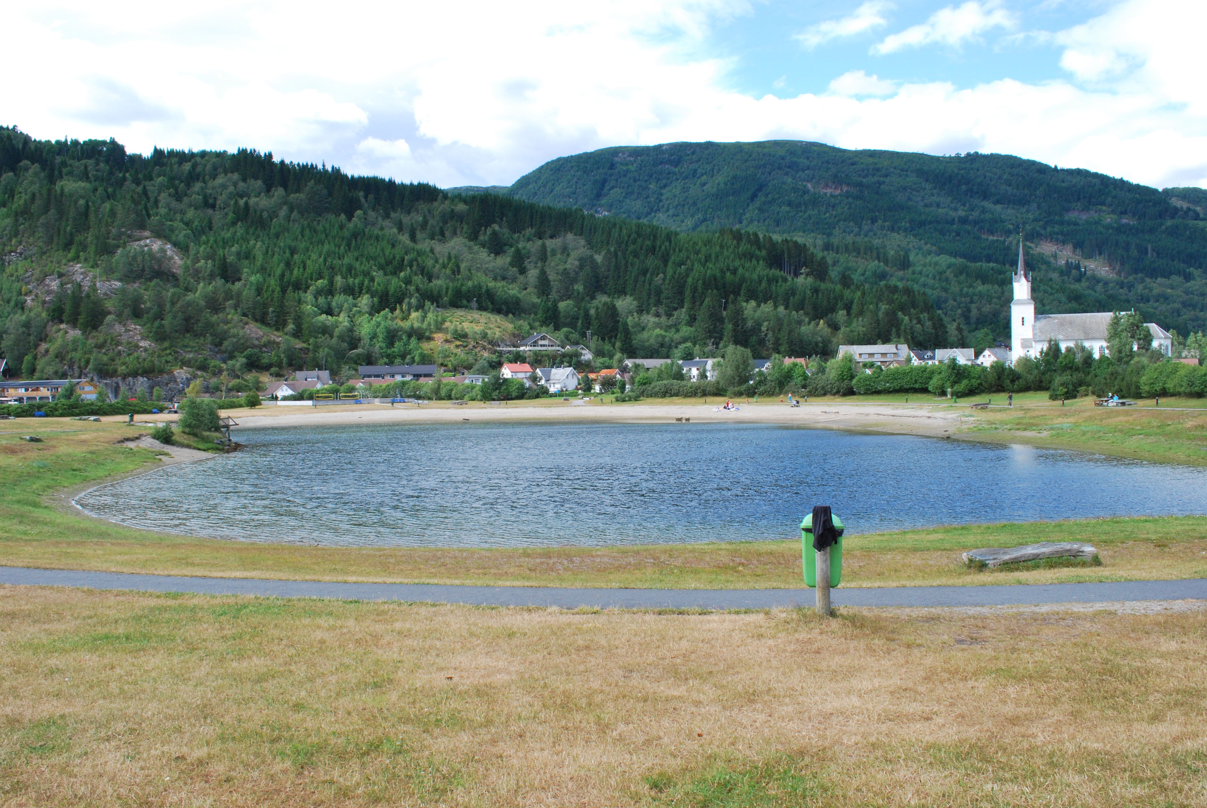 Sanden, Naustdal med sjøbassenget og Naustdal kyrkje